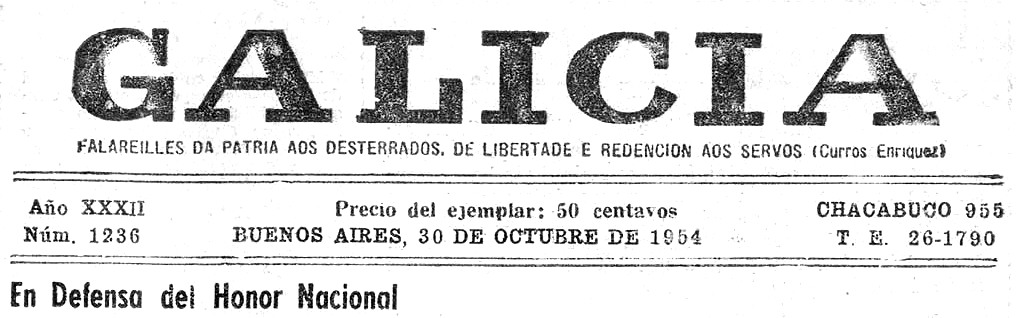 Galicia Publicación semanal editada por la Federación de Sociedades Gallegas. Portavoz de la Federación de Sociedades Gallegas. Chacabuco, 955. Buenos Aires. Argentina (1930 - )